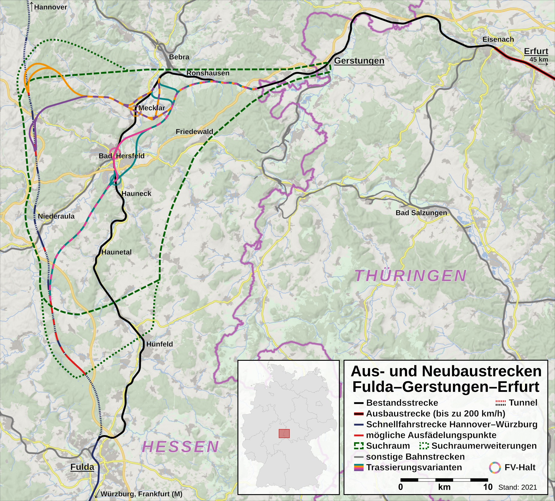 Aus- und Neubaustrecken Fulda–Gerstungen–Erfurt als Teil der Aus- und Neubaustrecke Hanau–Würzburg/Fulda–Erfurt. Stand 2019 ist der Abschnitt Eisenach–Erfurt ausgebaut, während der Trassenverlauf zwischen Gerstungen und Fulda noch nicht festgelegt ist. This map may be incomplete, and may contain errors. Don't rely solely on it for navigation.